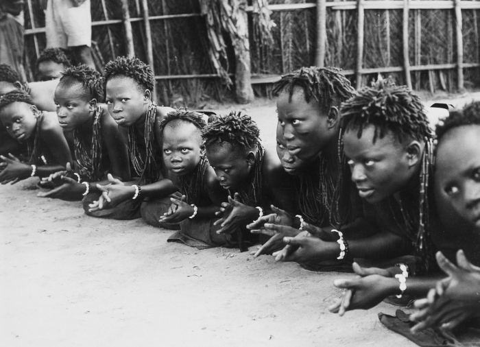 De opname is gemaakt tijdens de opleiding van genezeressen ("fetisheuses") te Benin. De vrouwen en meisjes voeren een begroetingsdans uit.